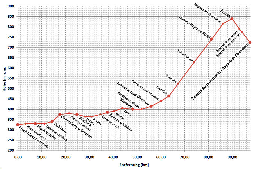 vereinfachtes Höhenprofil der Bahnstrecke Plzeň–Železná Ruda